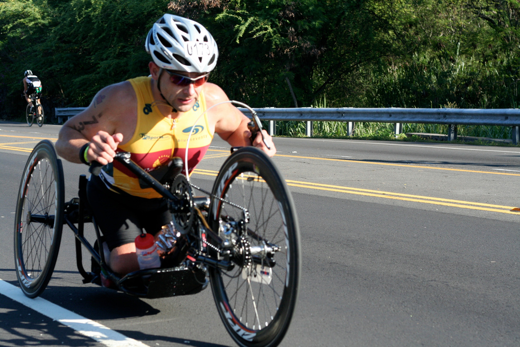 Paratriathète sur l'Ironman d'hawai en 2007